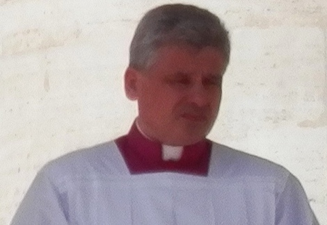 Uroczystość inauguracji pontyfikatu papieża Franciszka, 19 marca 2013. Ksiądz Konrad Krajewski jako ceremoniarz papieski.